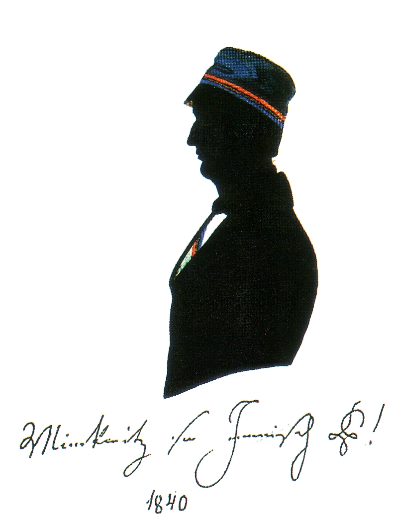 Heinrich Eduard Minckwitz (1819-1886), Abgeordneter 1848 (Vorparlament Paulskirche